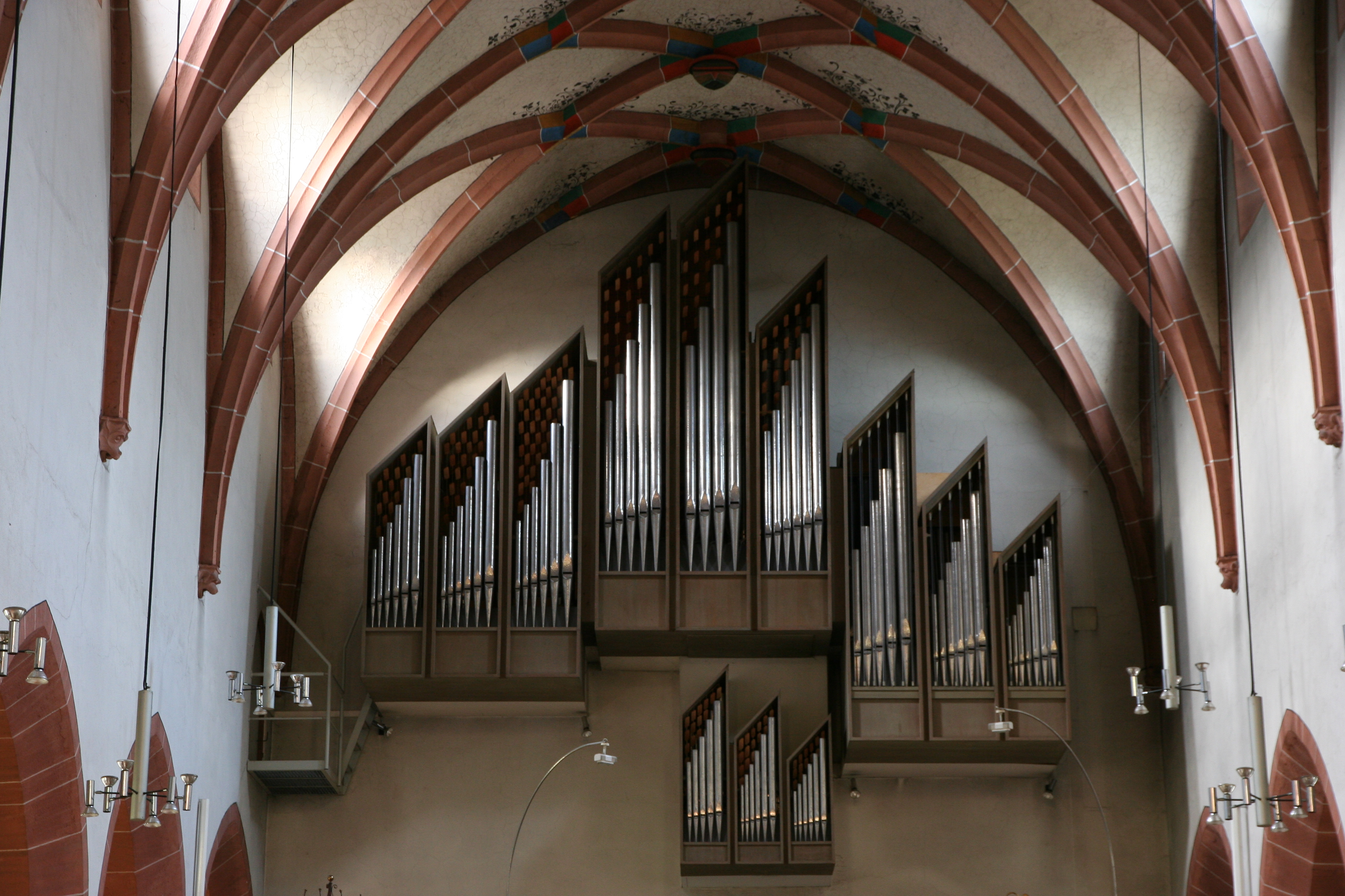 Römisch-katholische Liebfrauenkirche Gernsbach